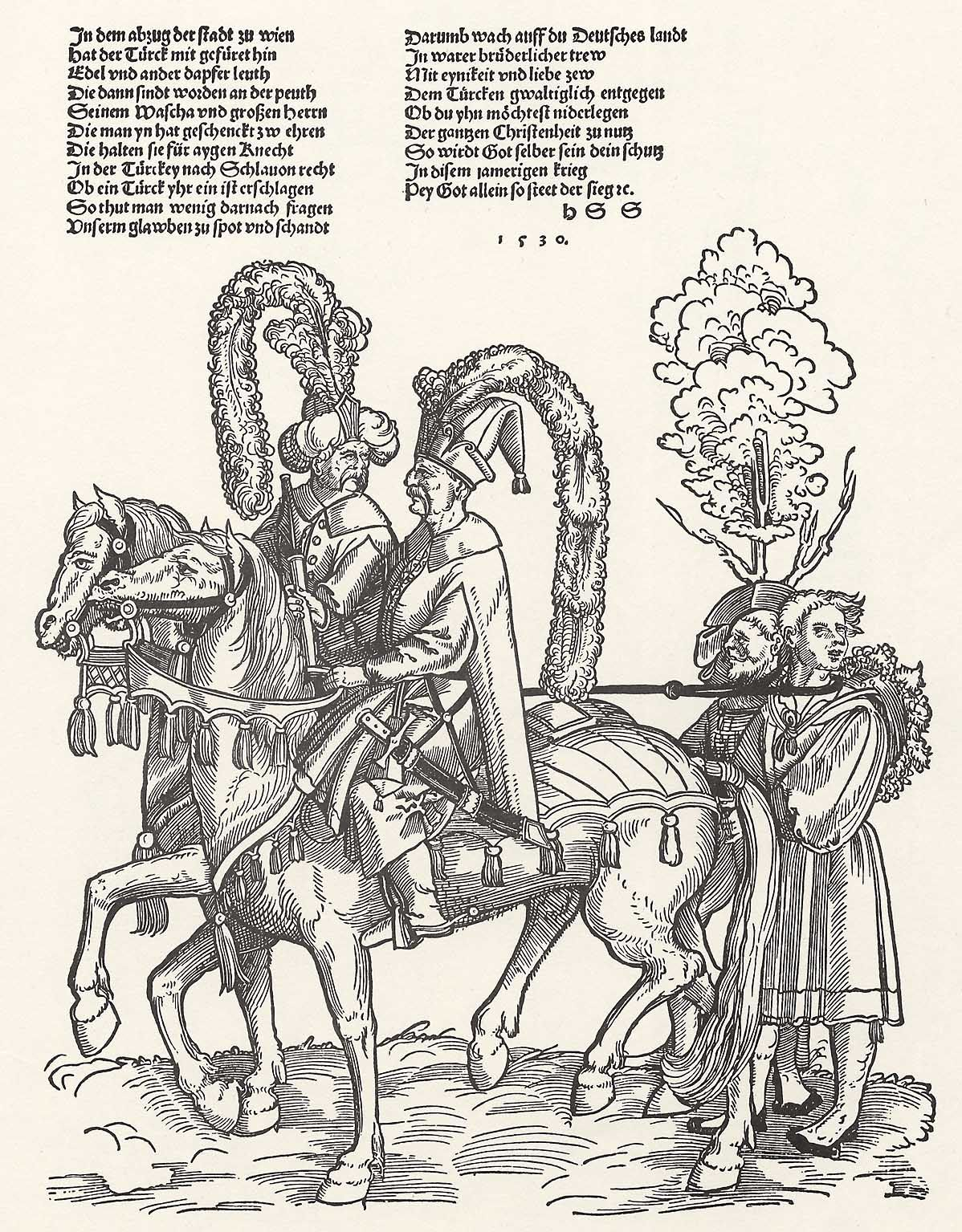 Двое турок и пленные.